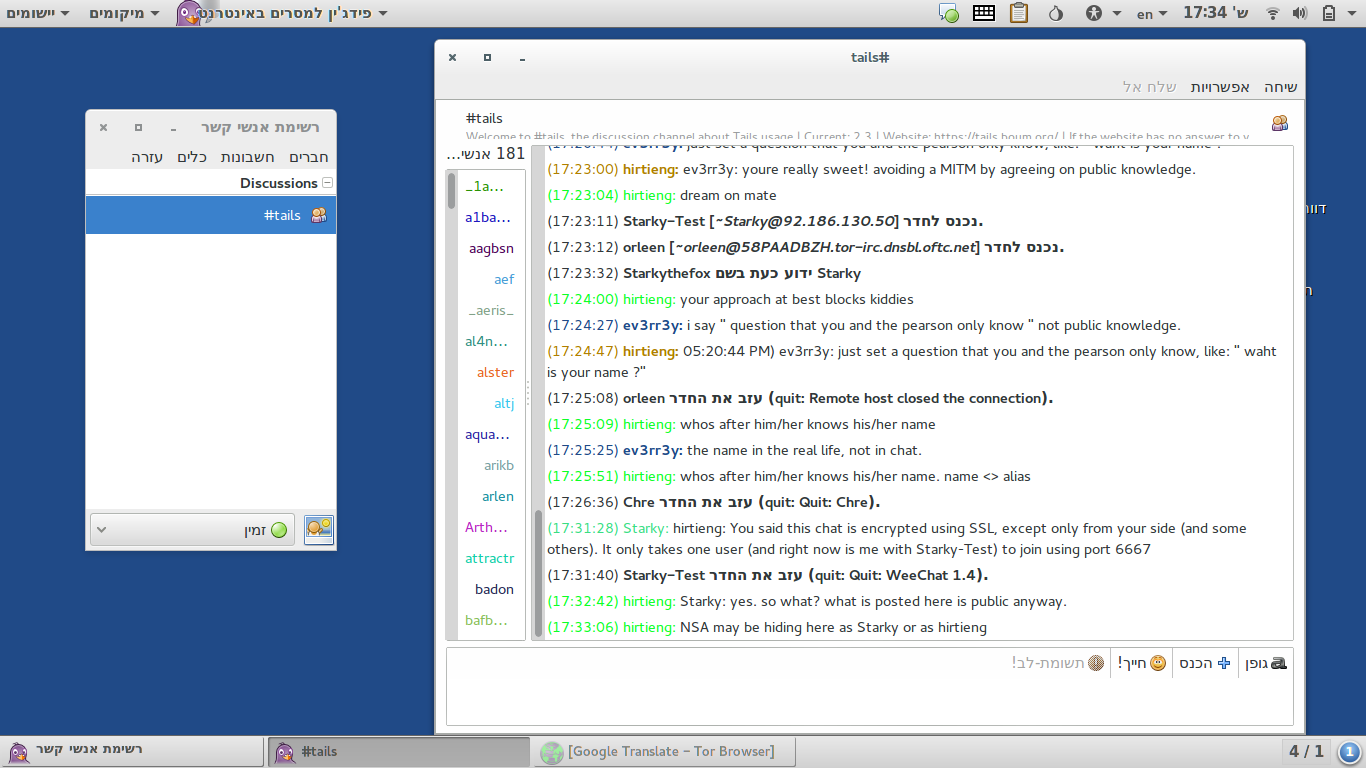 תמונה אשר נוצרה עבור הערך